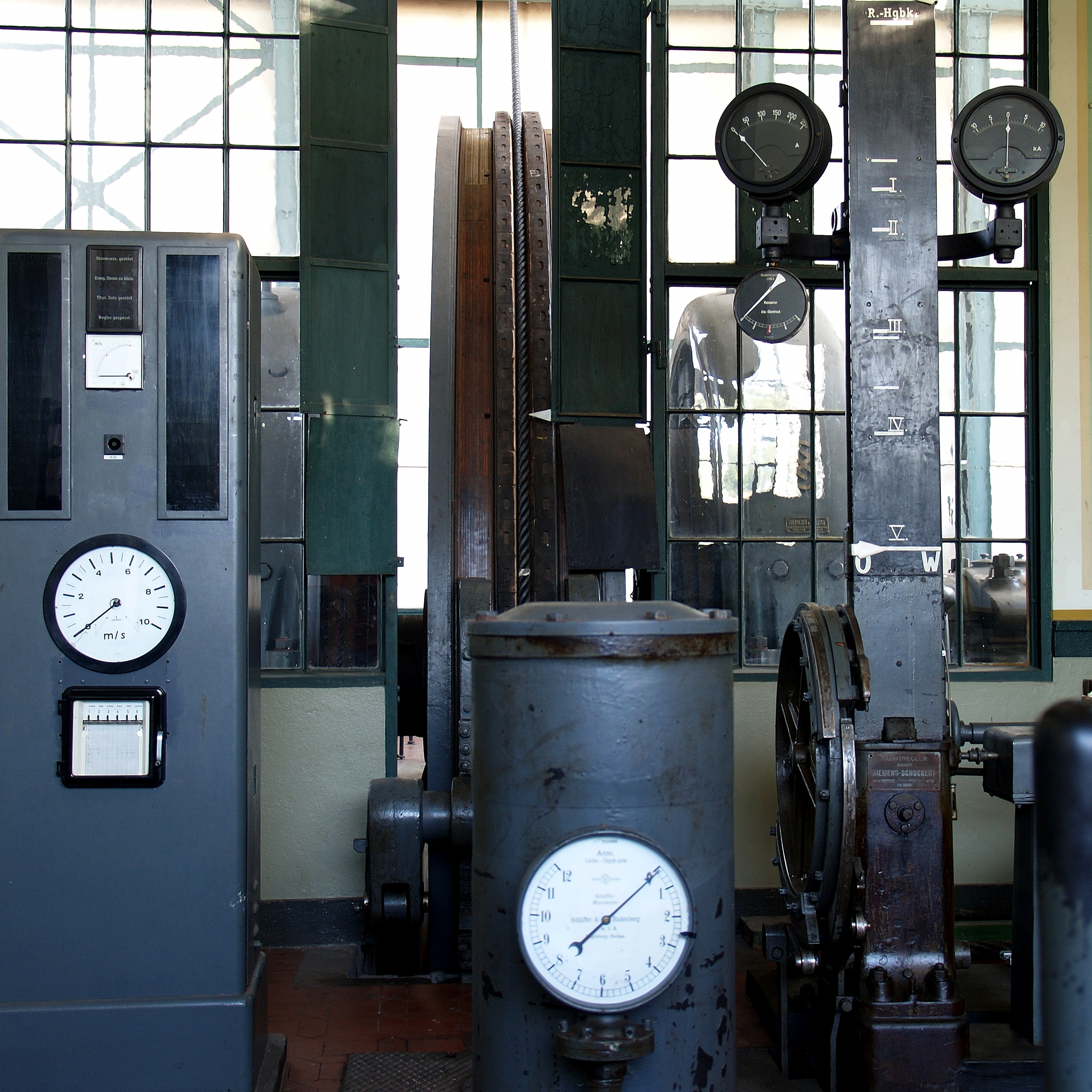 Förderseil auf der Treibscheibe auf der Fördermaschine der Zeche Zollern in Dortmund, Germany